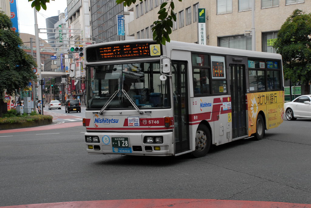 行橋営業所行き 2014-8-31撮影